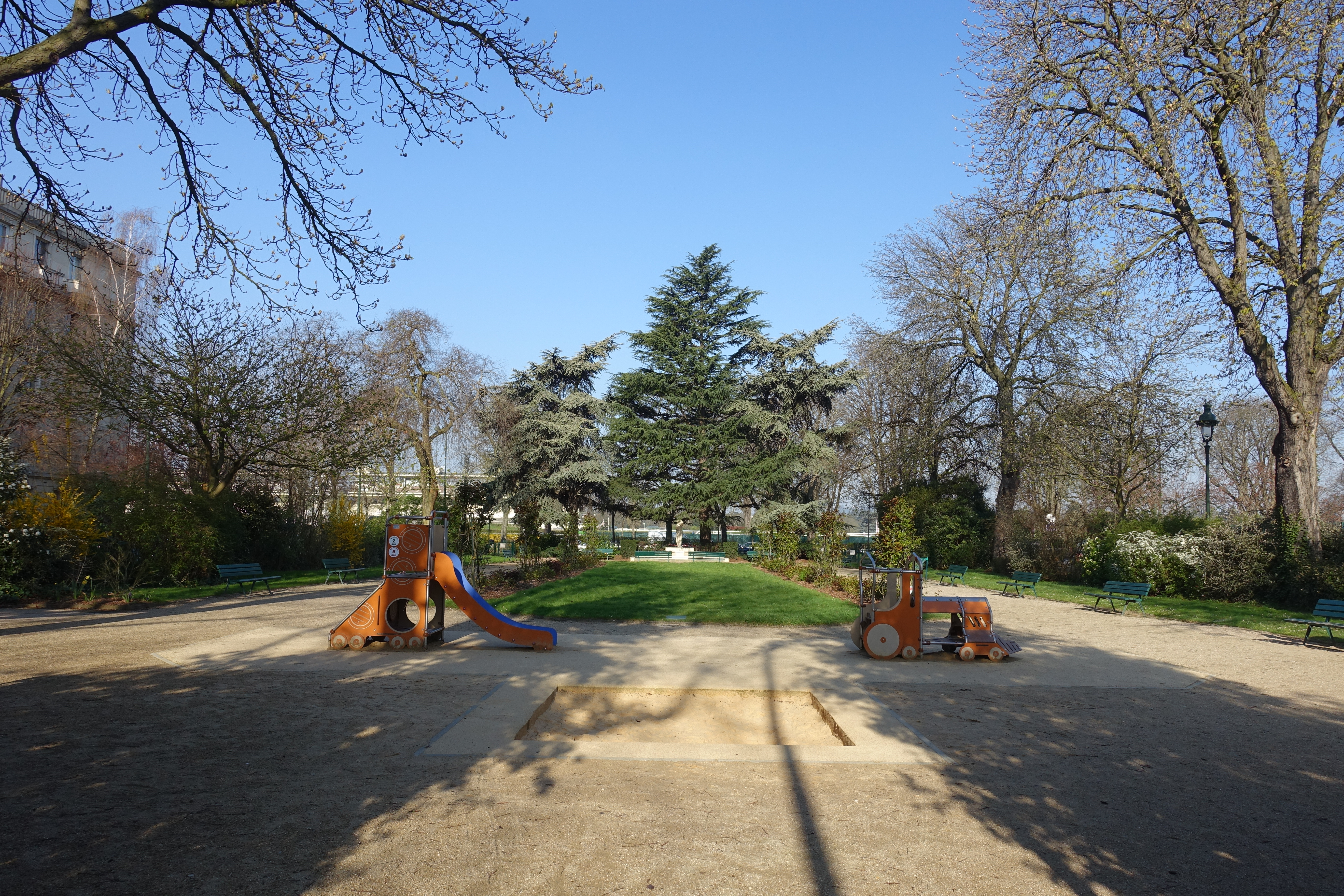 Square Tolstoï @ Paris 16